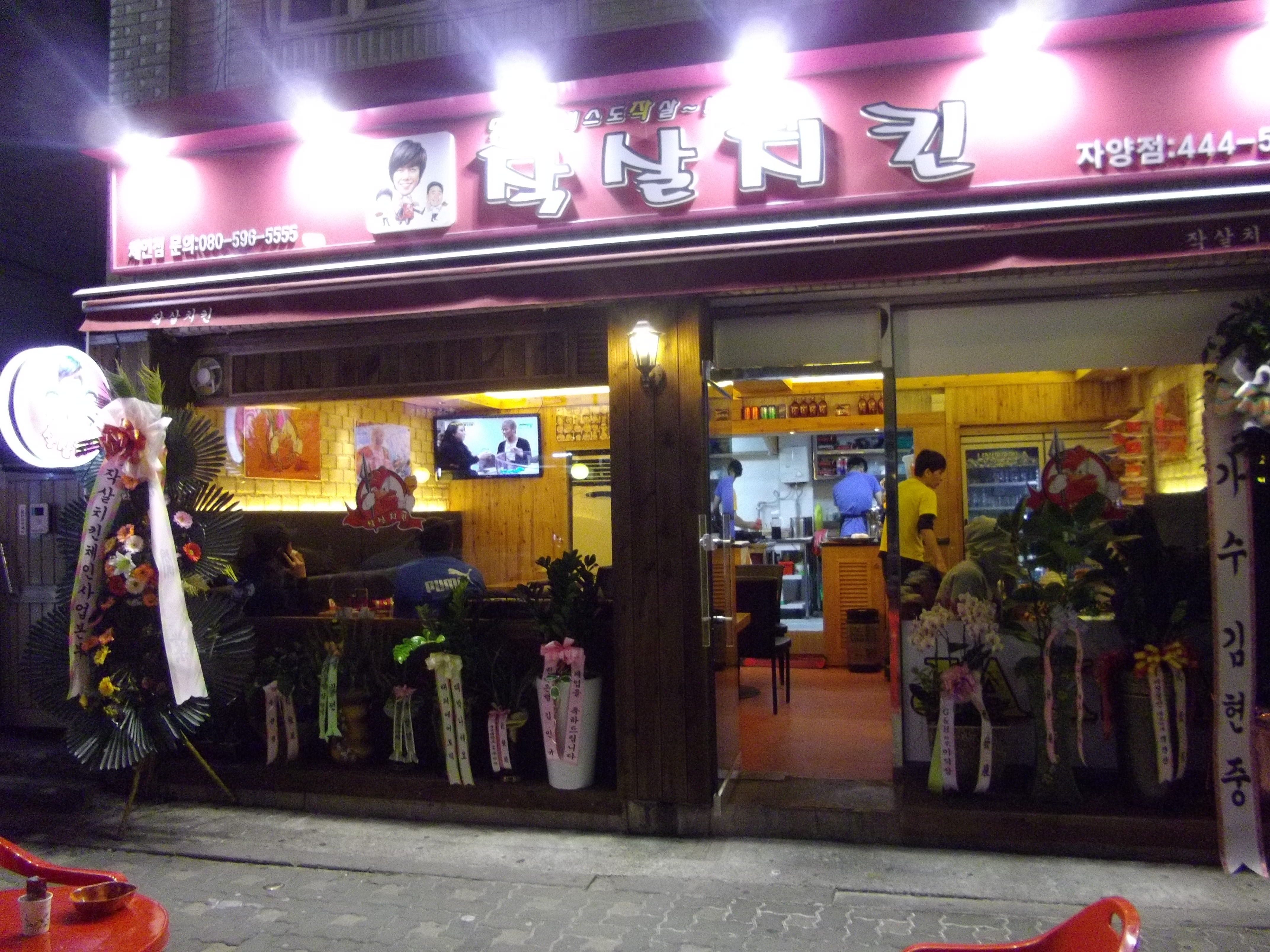 2011-10-09 in 魚叉